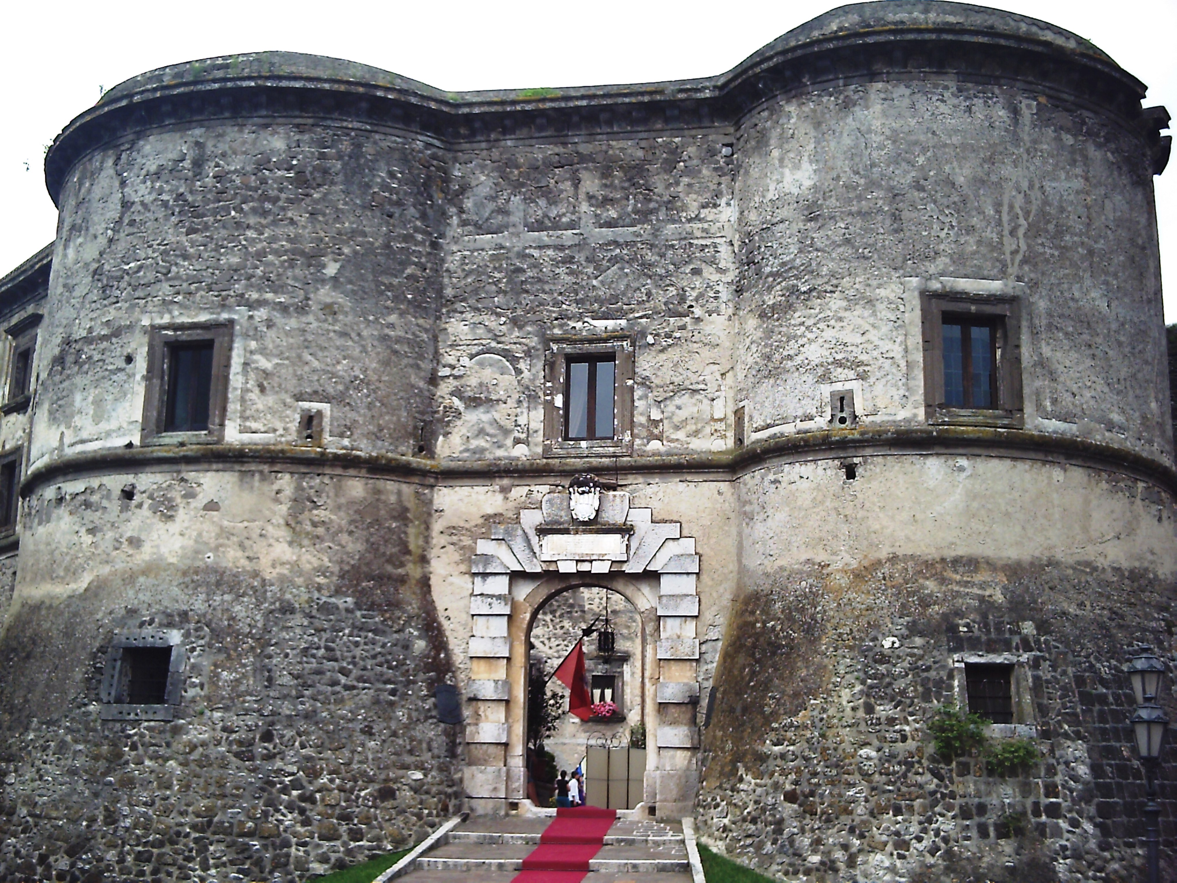 Esterno del Castello Ducale di Faicchio (Bn)